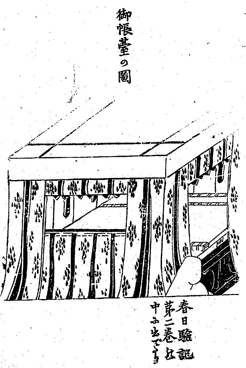 「御帳台の図」宮殿調度図解 (1905年) 東京：六合館書店刊 関根正直著